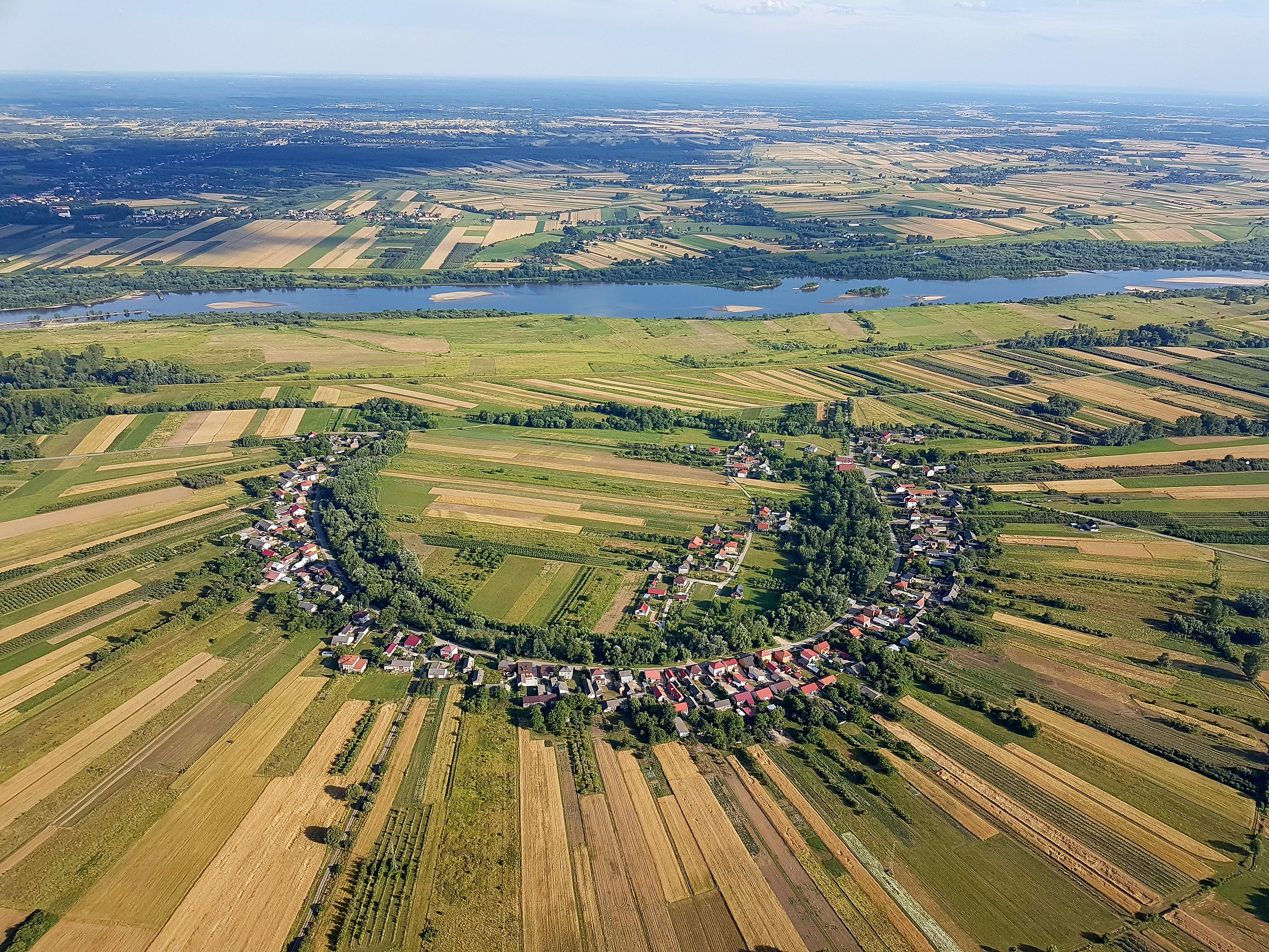 Zdjęcie lotnicze miejscowości Długołęka, wysokość 1050m AMSL